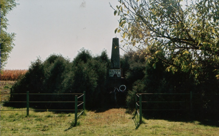 Szatmári béke emlékműve, Kismajtény (Moftinu Mic)